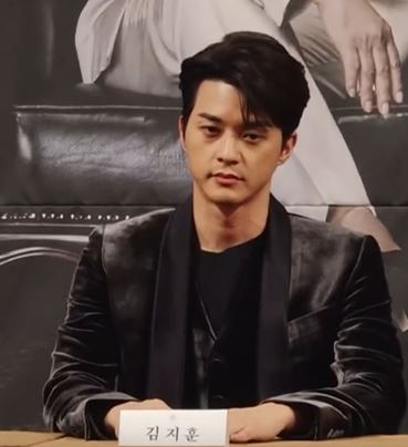 24일 서울 강남구 임피리얼팰리스 호텔에서 진행된 TV CHOSUN(TV조선)의 새 토일드라마 '바벨'의 제작발표회